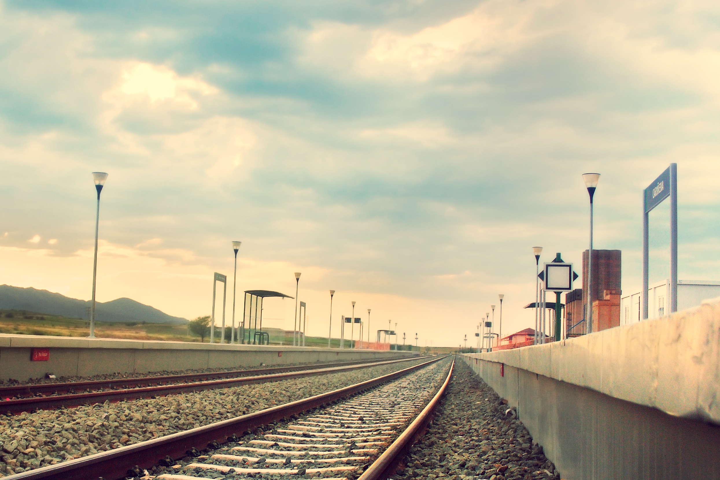 Cariñena train station Cariñena, Aragón, España +info Big On Black